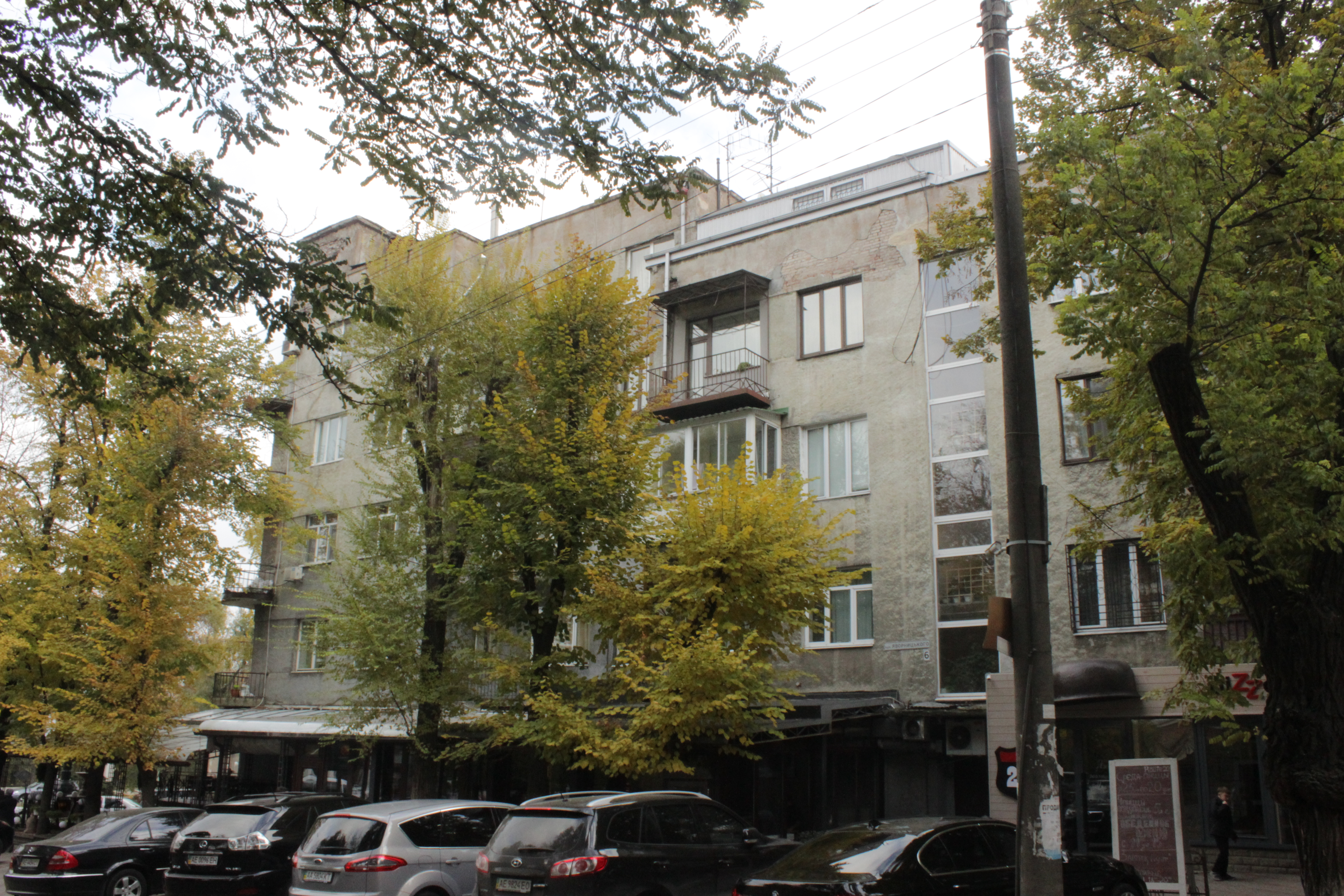 Житловий будинок товариства колишніх політкаторжан, Дніпро, Жовтневий пров., 6 (Яворницького вул.)